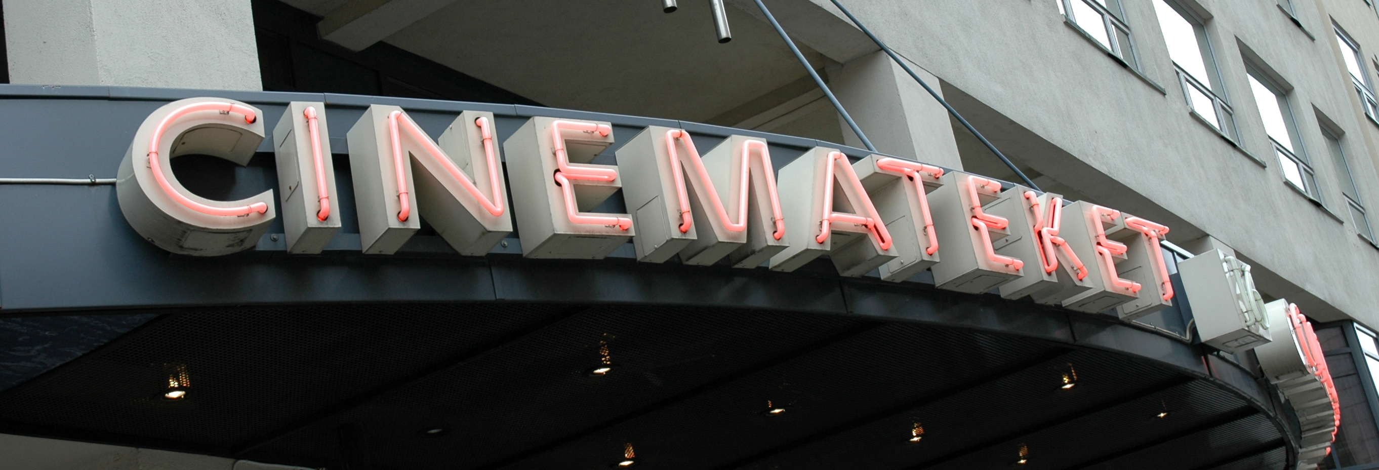 Cinemateket Oslo